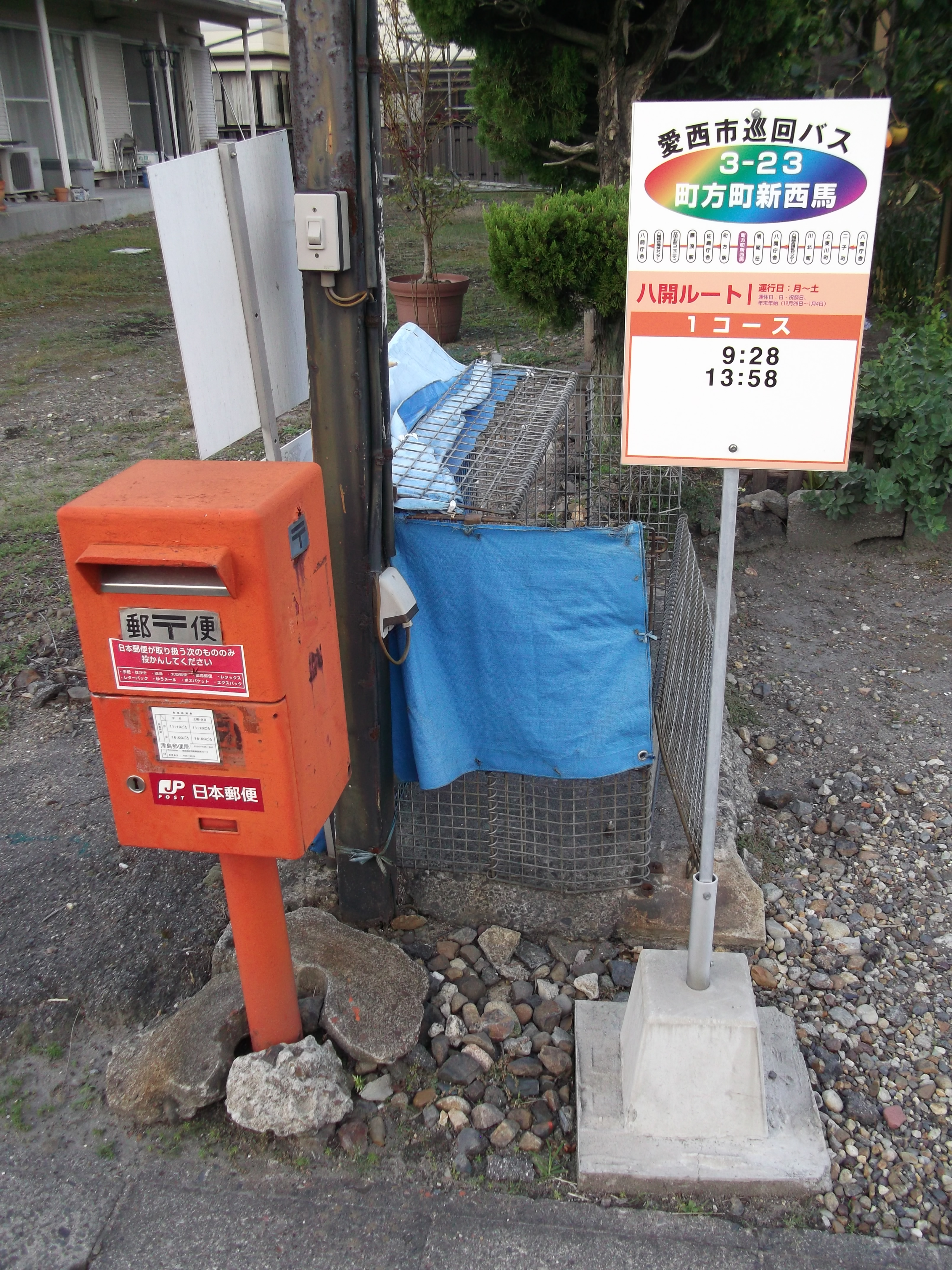 愛西市町方町の愛西市巡回バス「町方町新西馬」停留所